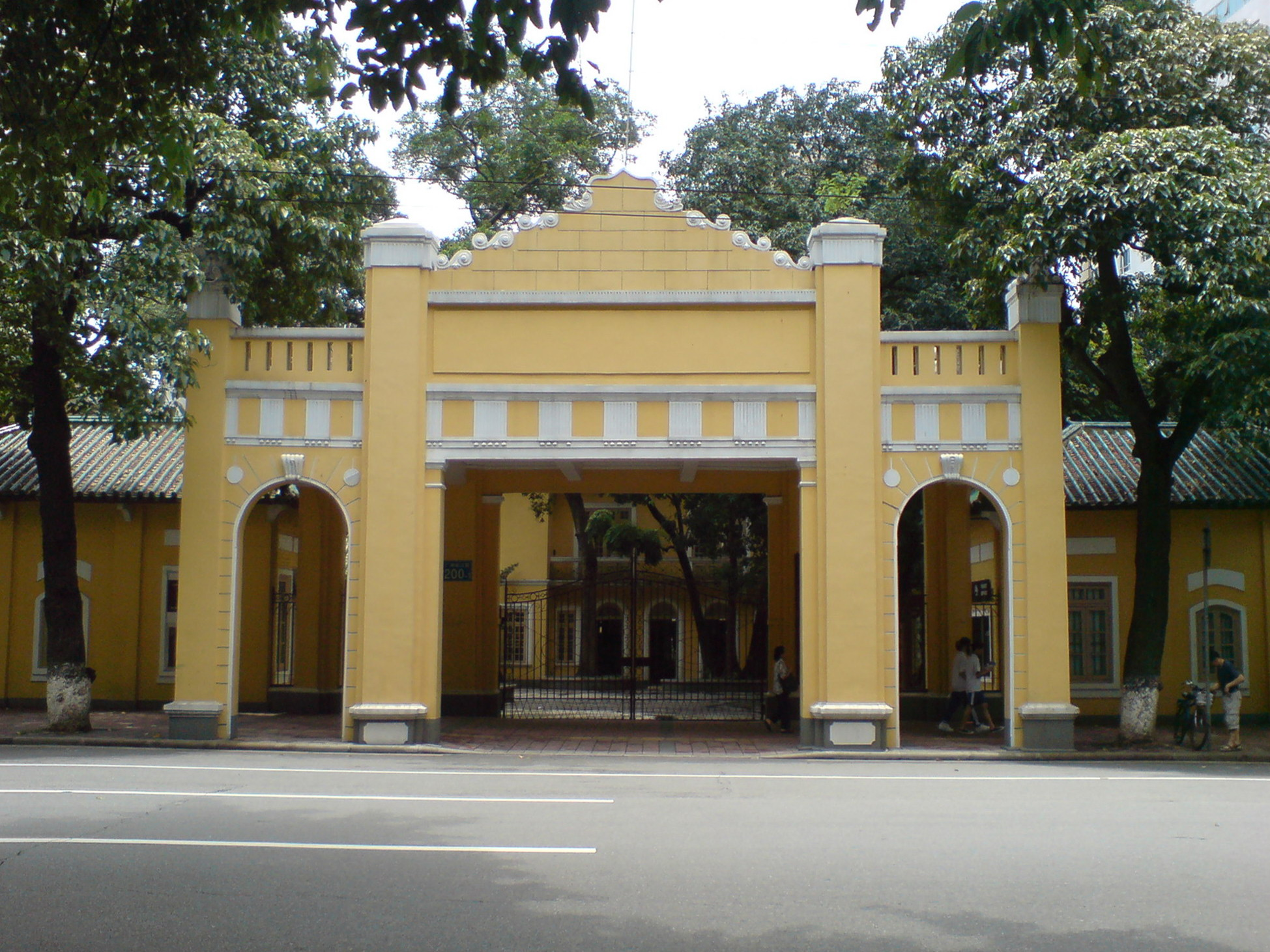 广州起义纪念馆